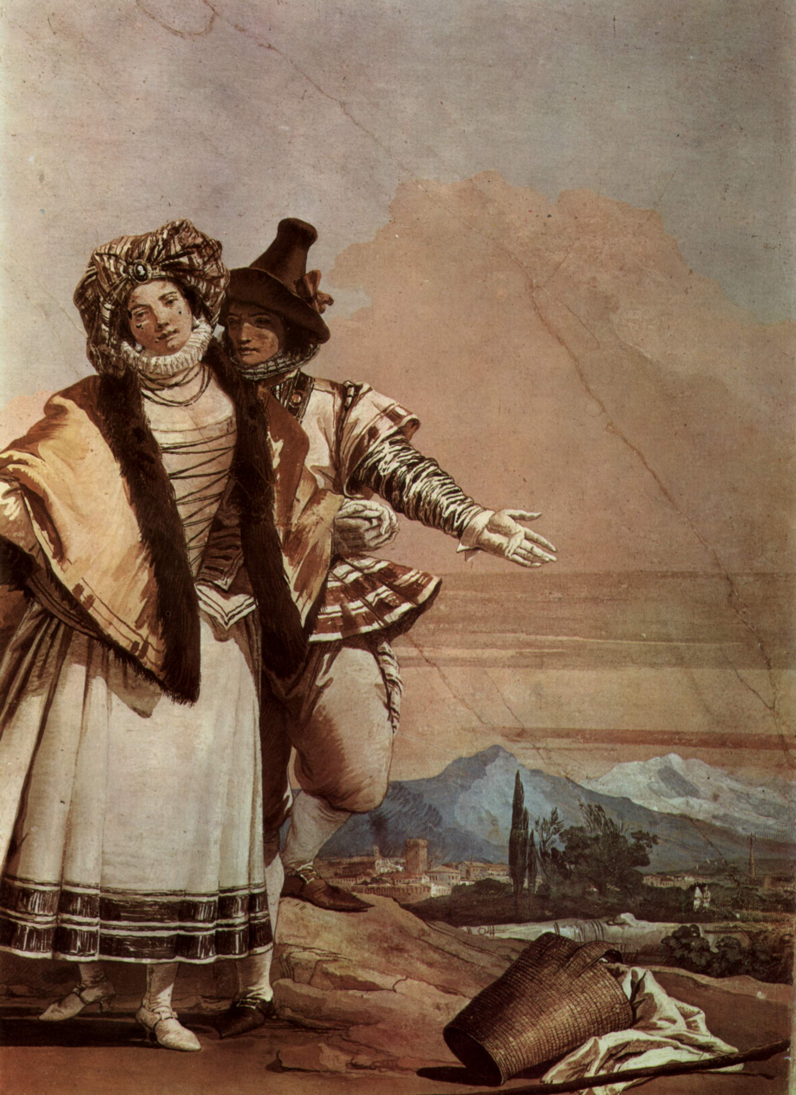 Fresken in der Villa Vallmarana, Vicenca